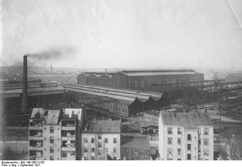 Blick in die Germaniawerft II in Kiel